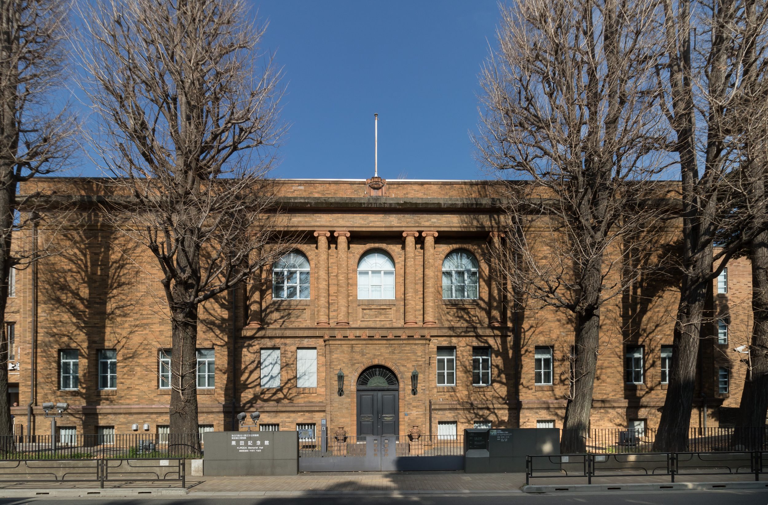 黒田記念館 （東京都台東区）、岡田信一郎設計（1928）